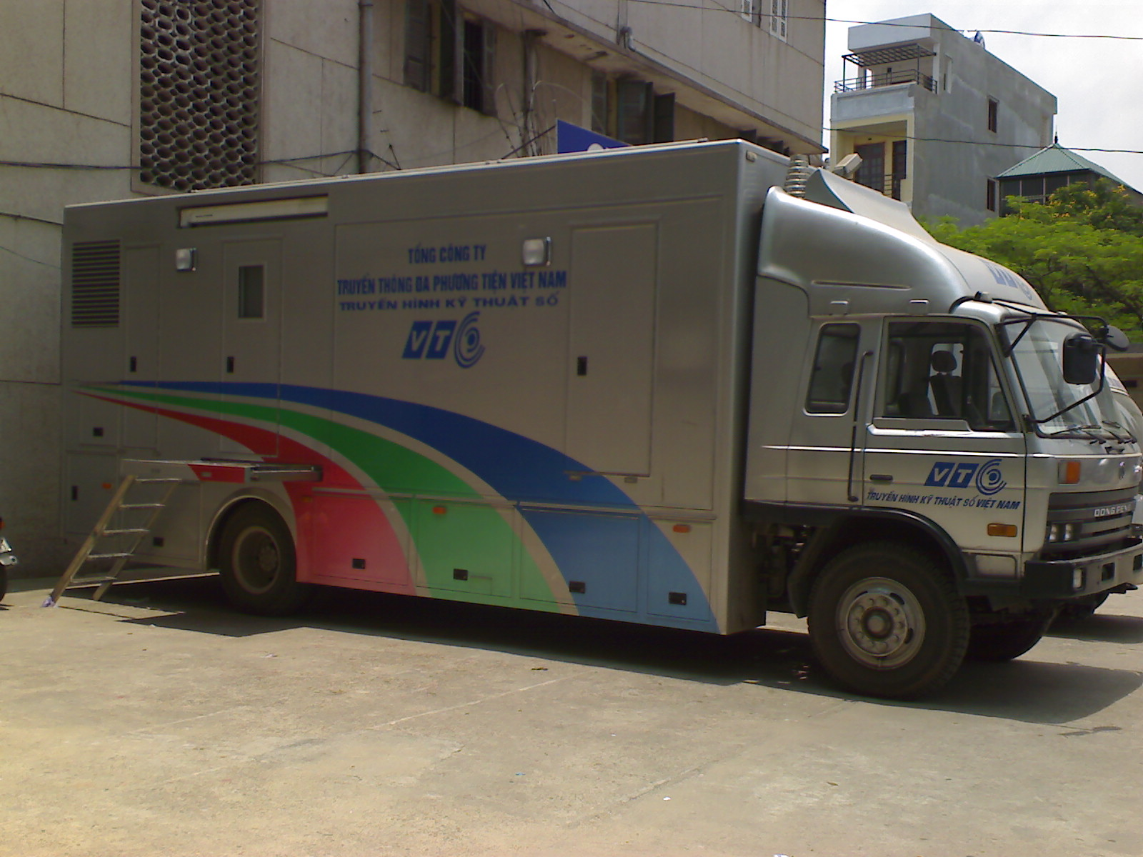 Giấy phép